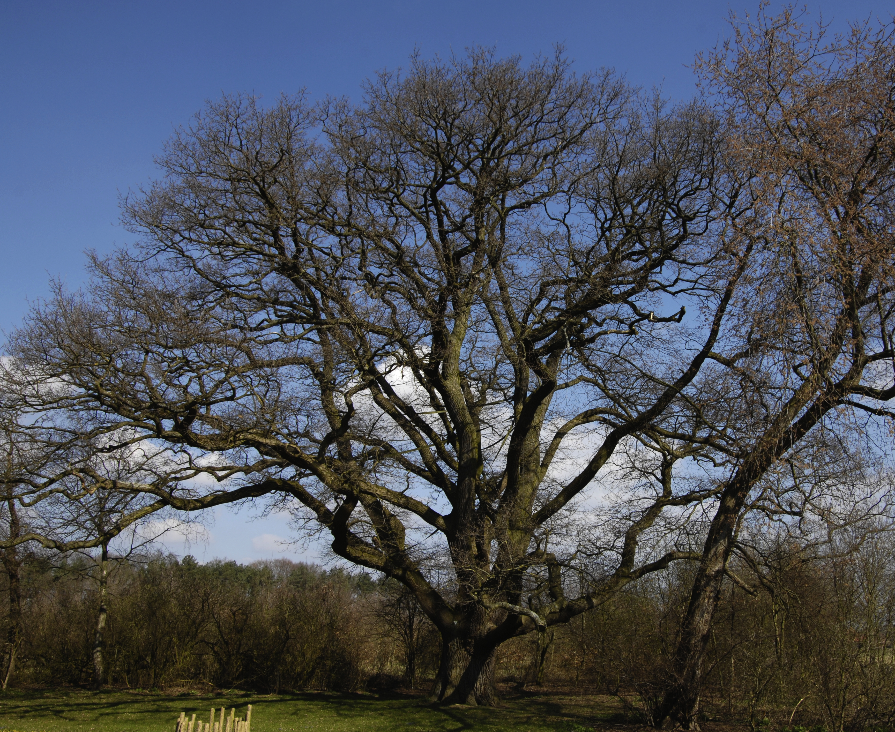 Sehr alte und große Eiche am Gut Winkhausen